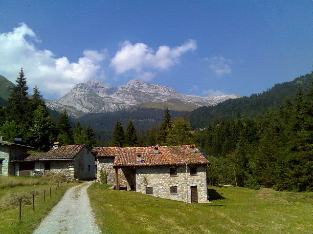 Stalle del Moschel, Oltressenda Alta, Bergamo, Italia